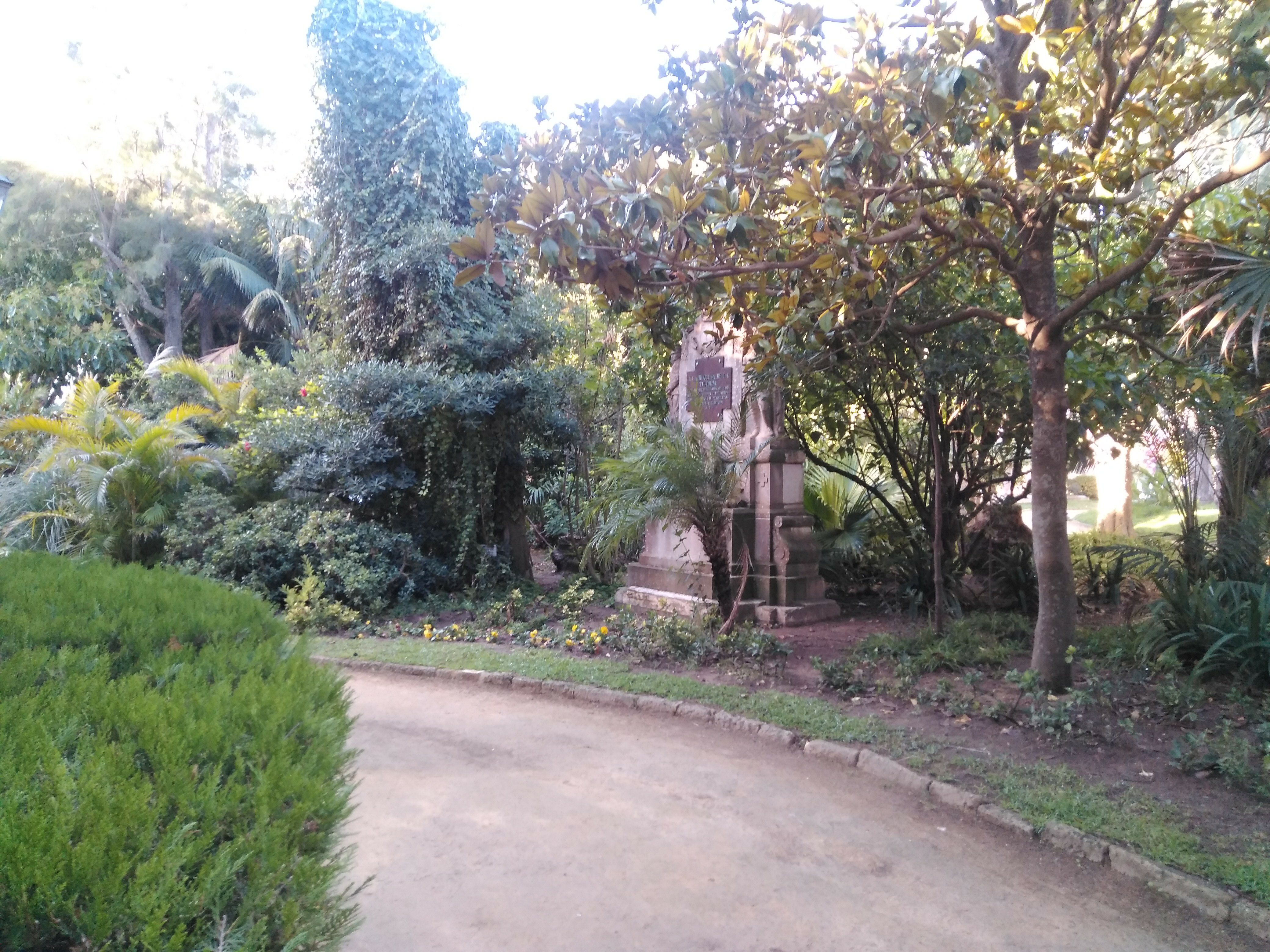 Monumento duquesa Victoria en Cádiz, existe una réplica en la fachada del hospital de la Cruz Roja San José y Santa Adela en Madrid.